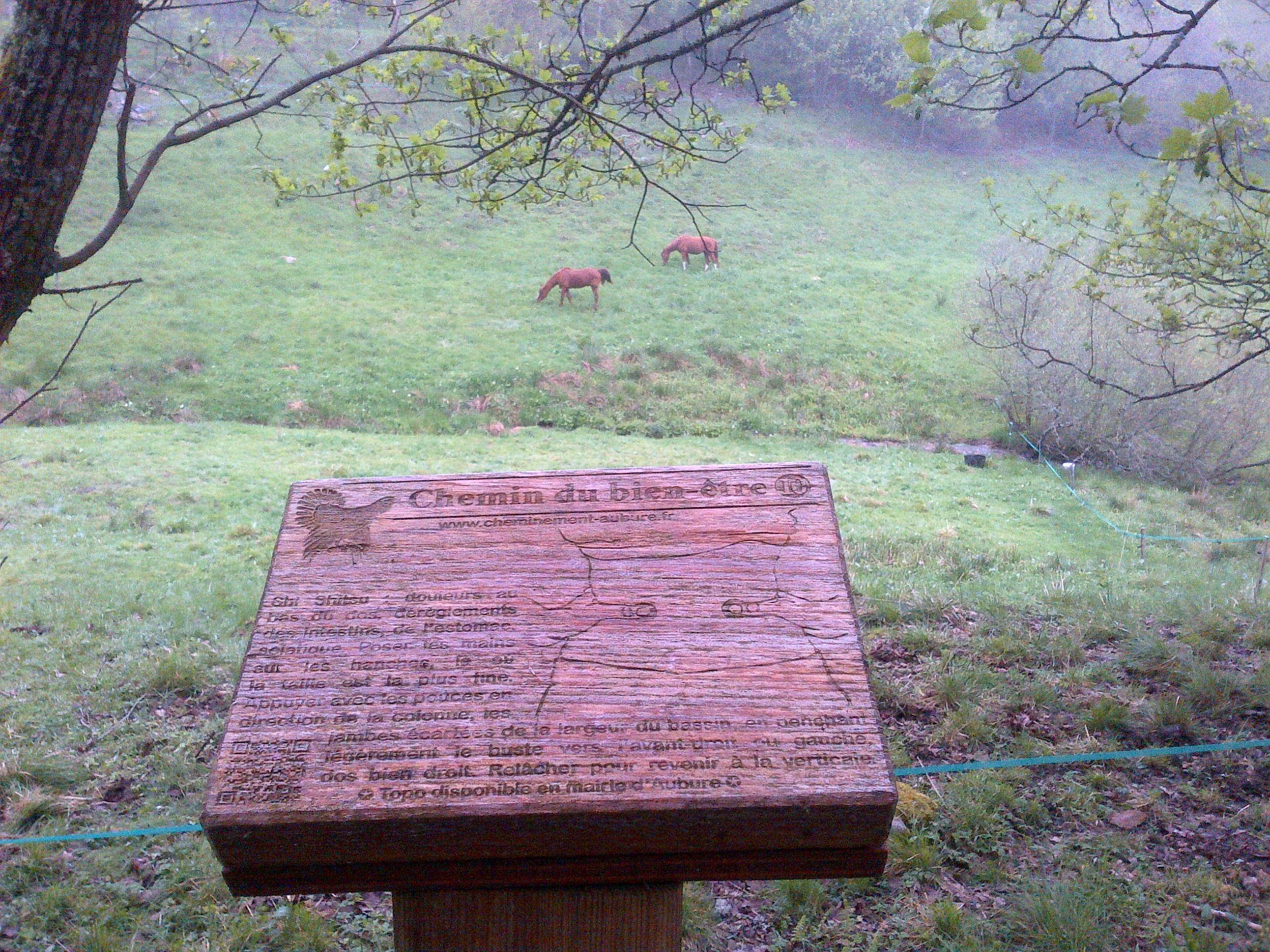 chevaux à Aubure 68150